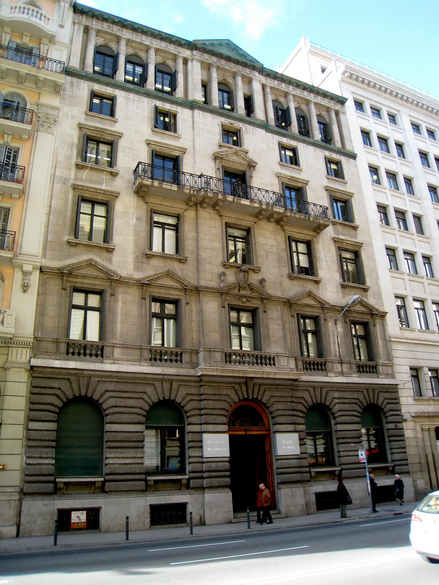 Casal del Metge, obra d' Adolf Florensa i Ferrer (1931-32), a la Via Laietana, 31 (Barcelona-Catalunya).